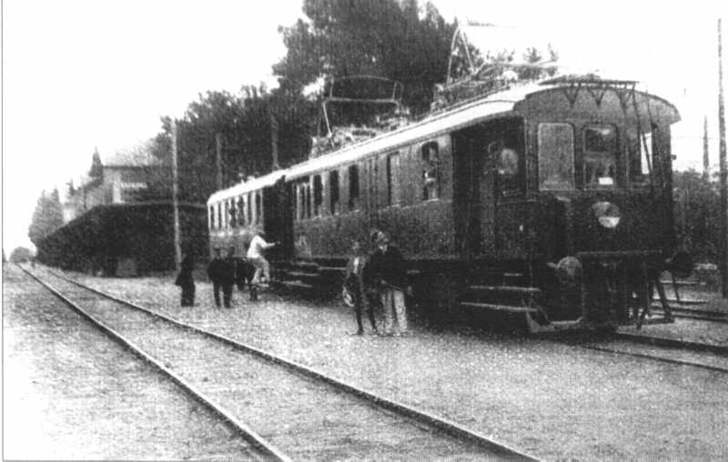 A Vác–Budapest–Gödöllő HÉV egyik villamos motorkocsija Gödöllő állomáson a vonal megnyitása után nem sokkal, az 1910-es években